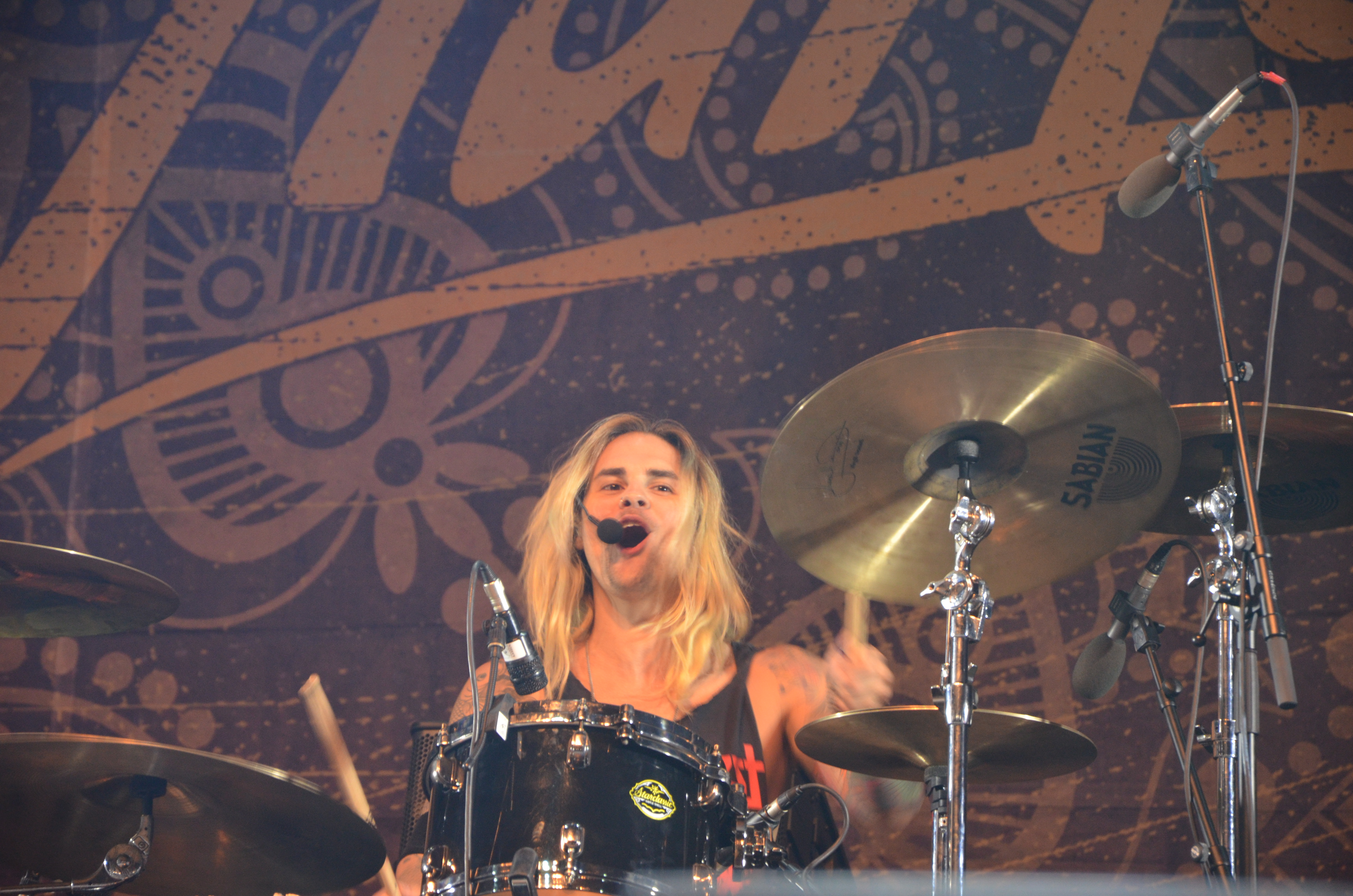 Bruno Agra von We Are Harlot bei Rock am Ring 2015.